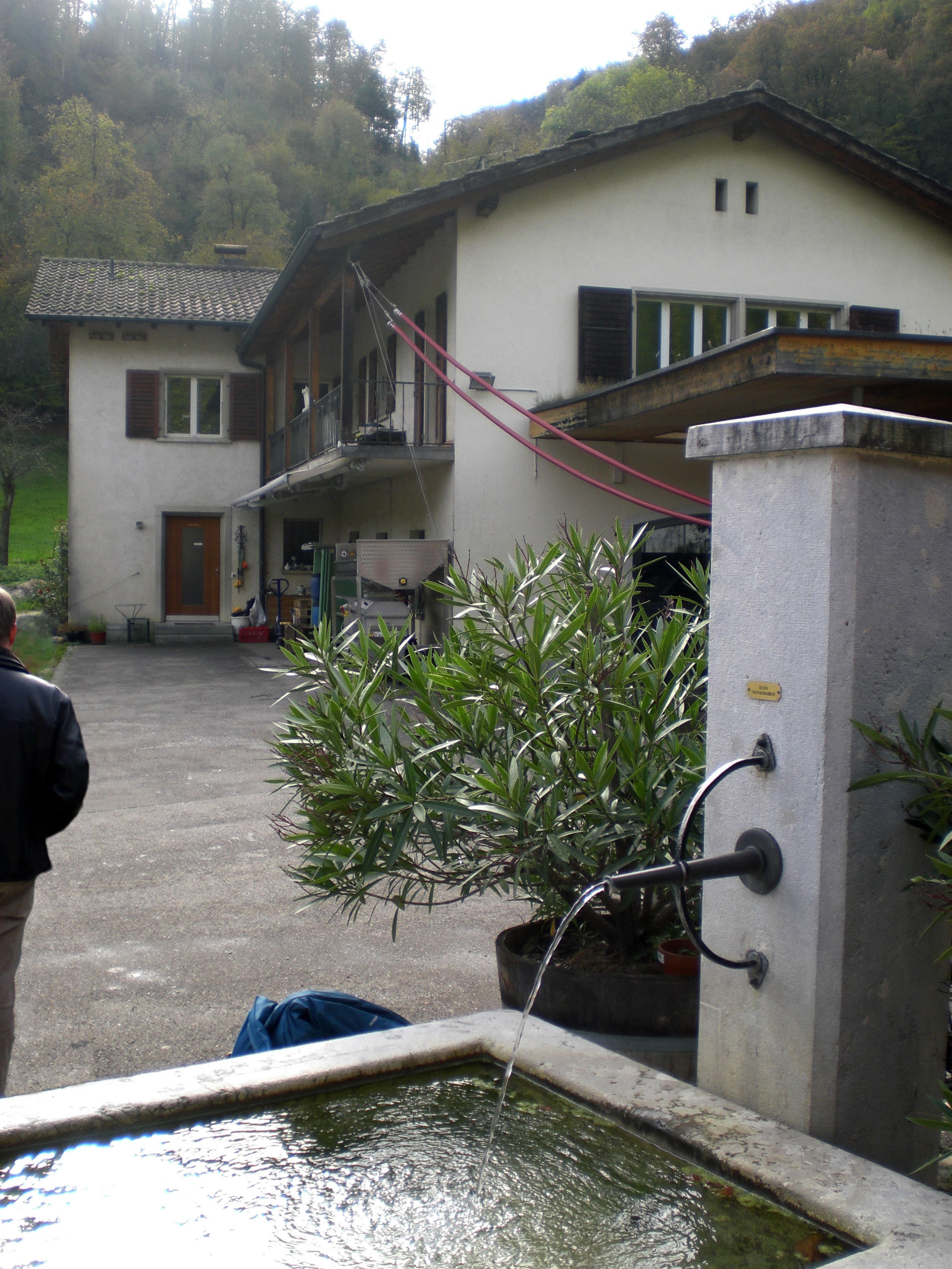 Weingut Tschäpperli in Aesch (Basel Land, Schweiz), Hof. Traubenannahme verdeckt durch Lorbeerbusch